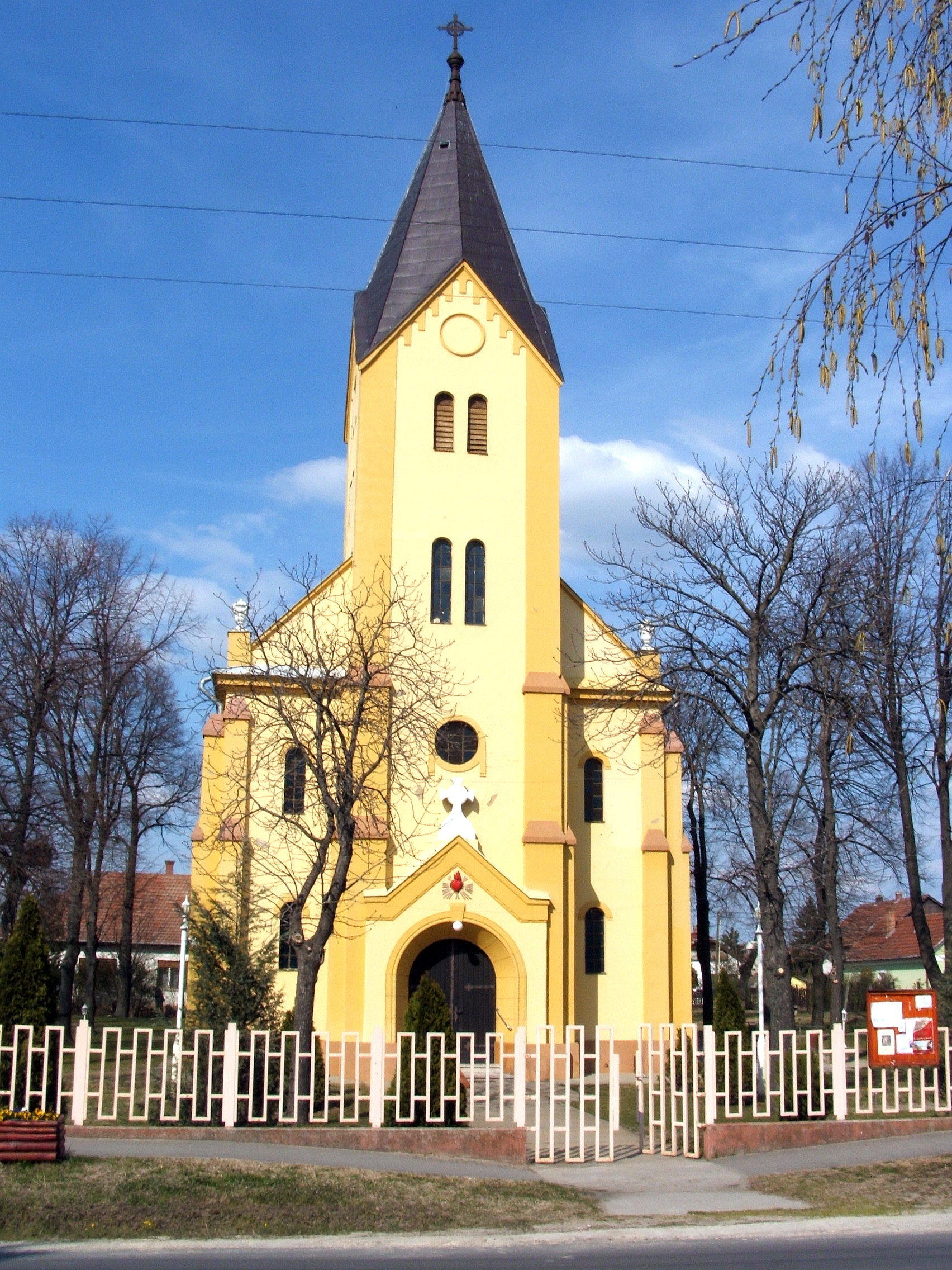 A hetényegyházi Jézus Szíve templom